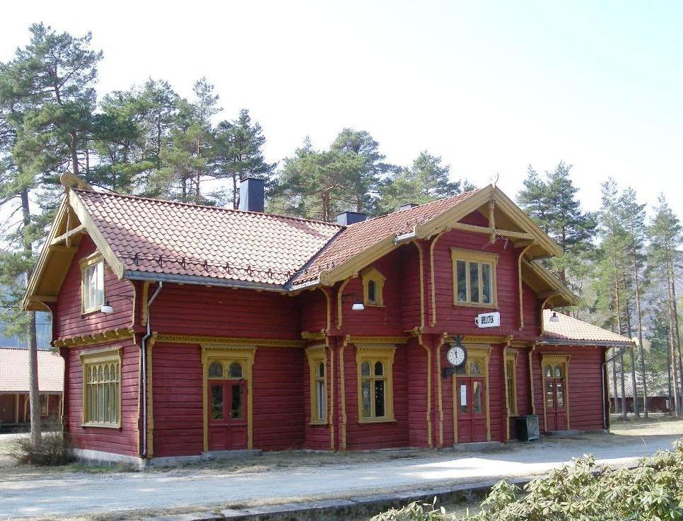 Byglandsfjord stasjon på den nedlagte Setesdalsbanen huser i dag et bibliotek.